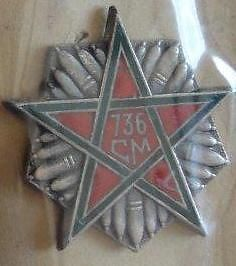 Insigne de la 736e Cie Munitions.